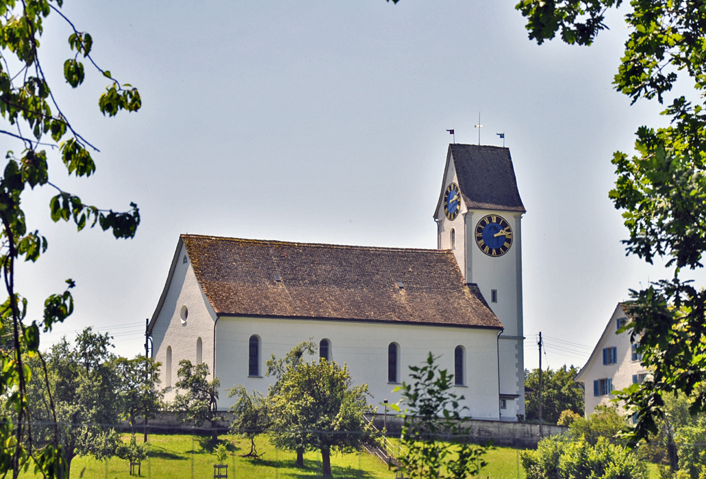 Die Kirche von Oetwil s. S.